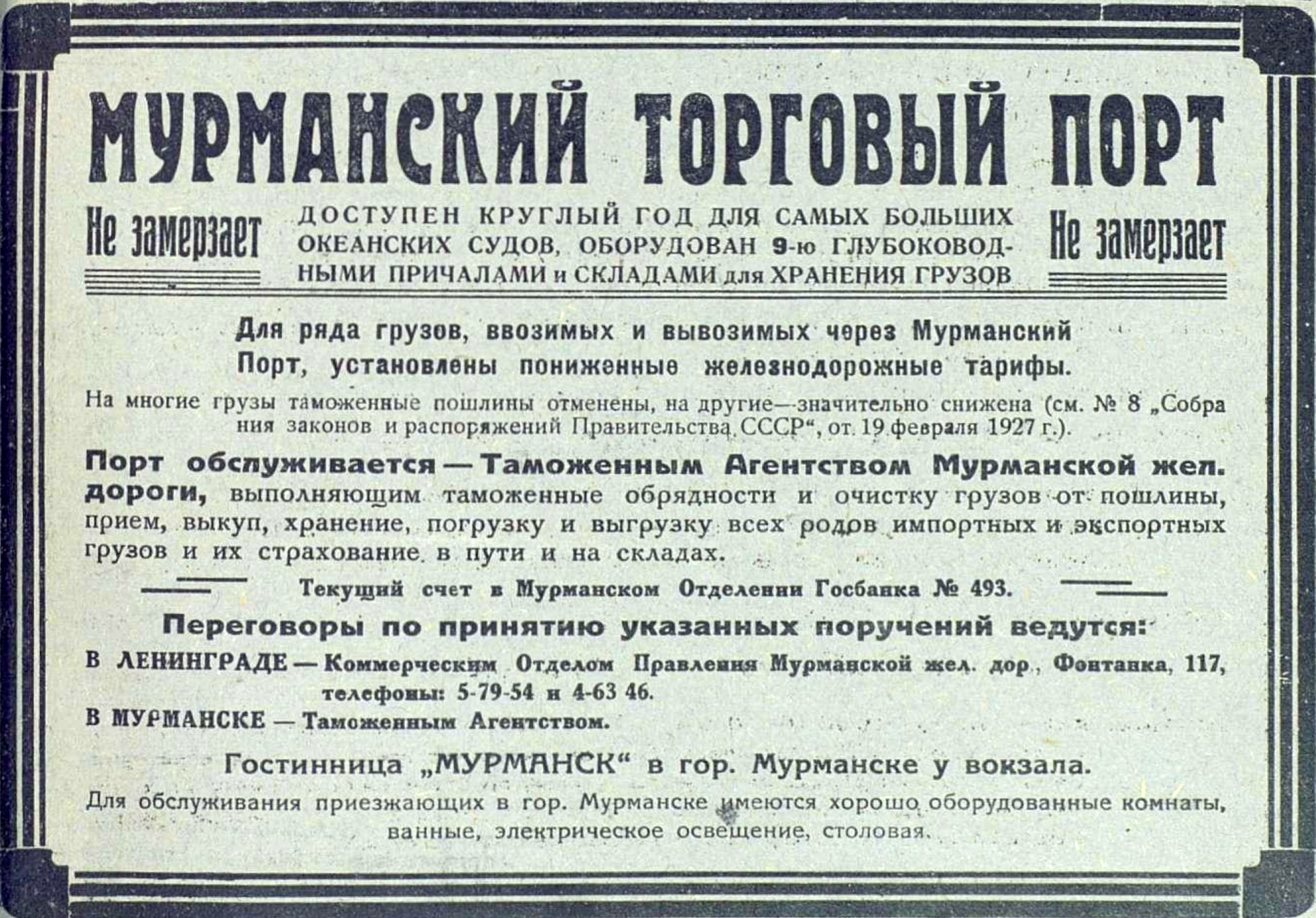 Реклама Мурманского торгового порта, 1930 год.